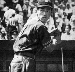 大下弘の打席での構え